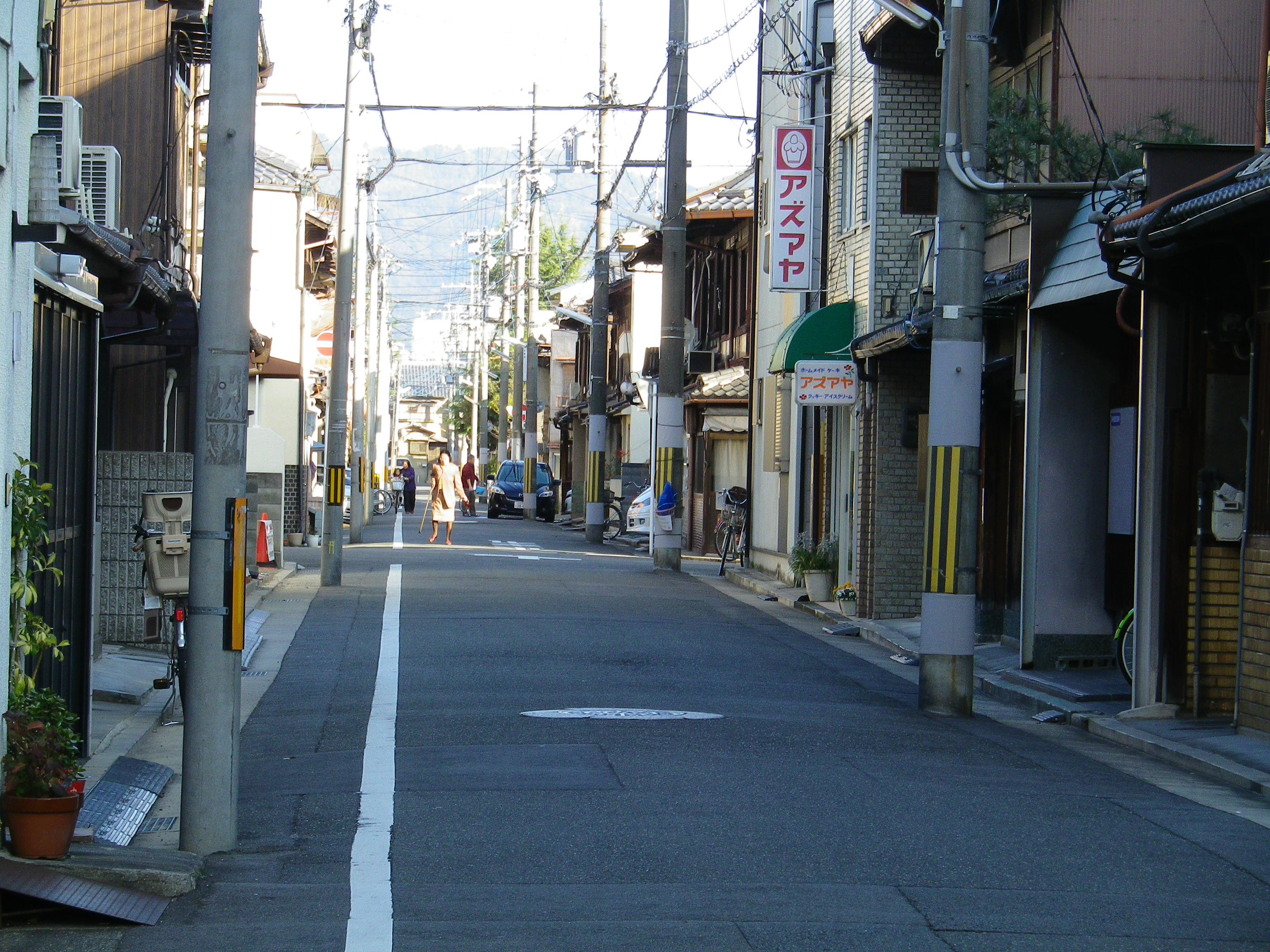 郁芳通の通景。千本通東入から東方向。